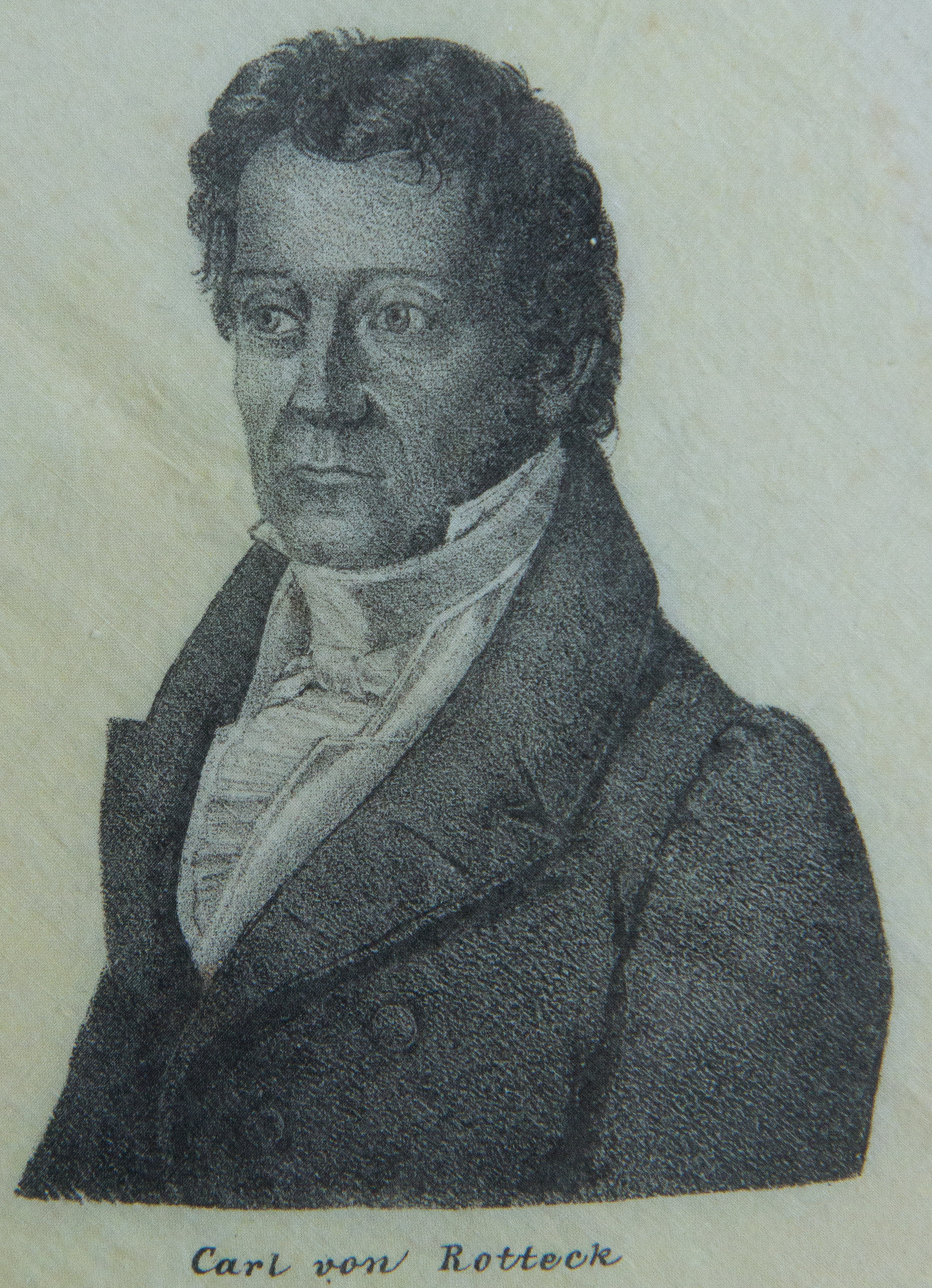 Hambacher Tuch, fotografiert im Archiv des Liberalismus in Gummersbach: Karl von Rotteck (1775-1840)